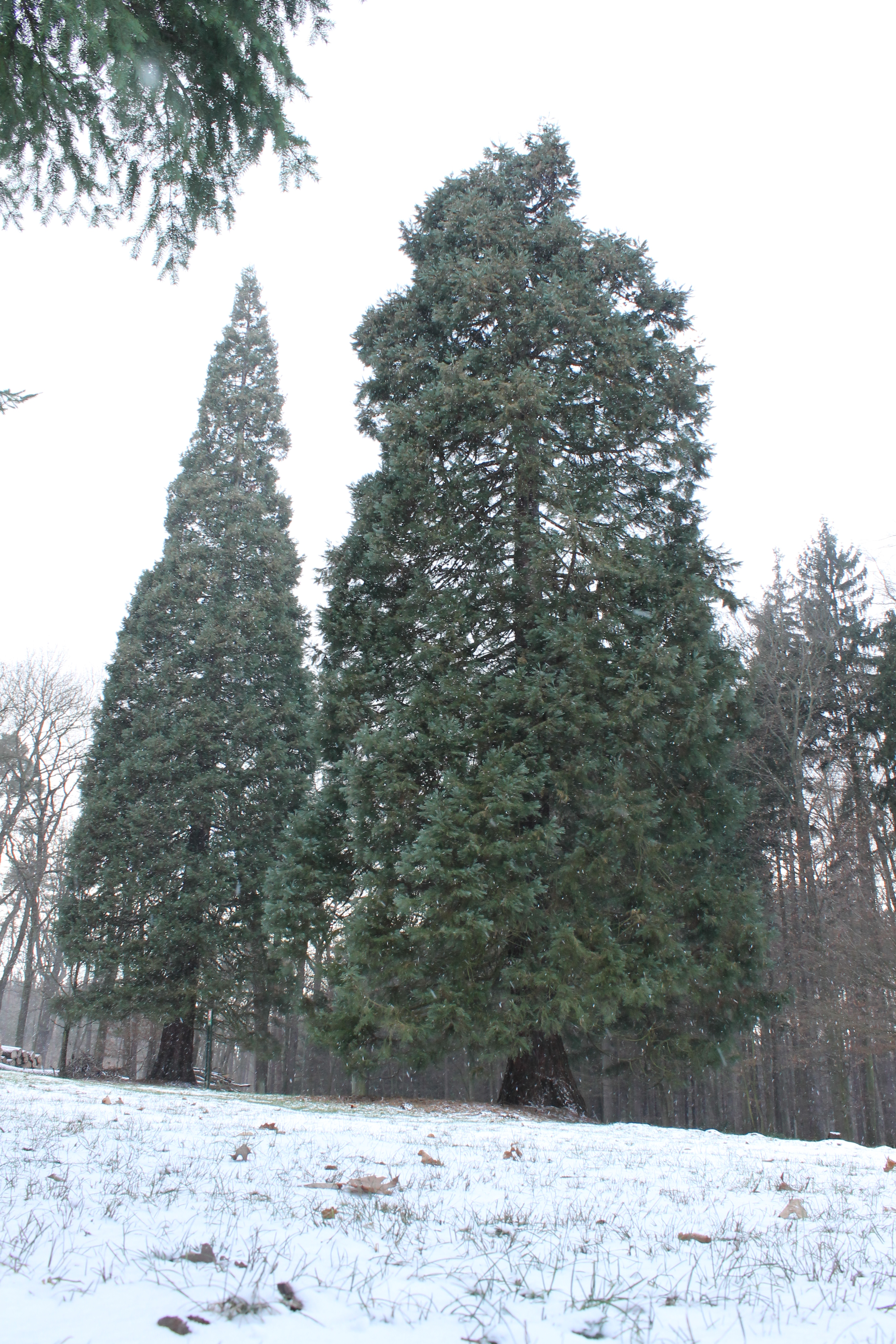 Sekvojovce v Michelském lese, které byly prohlášeny za památné stromy.